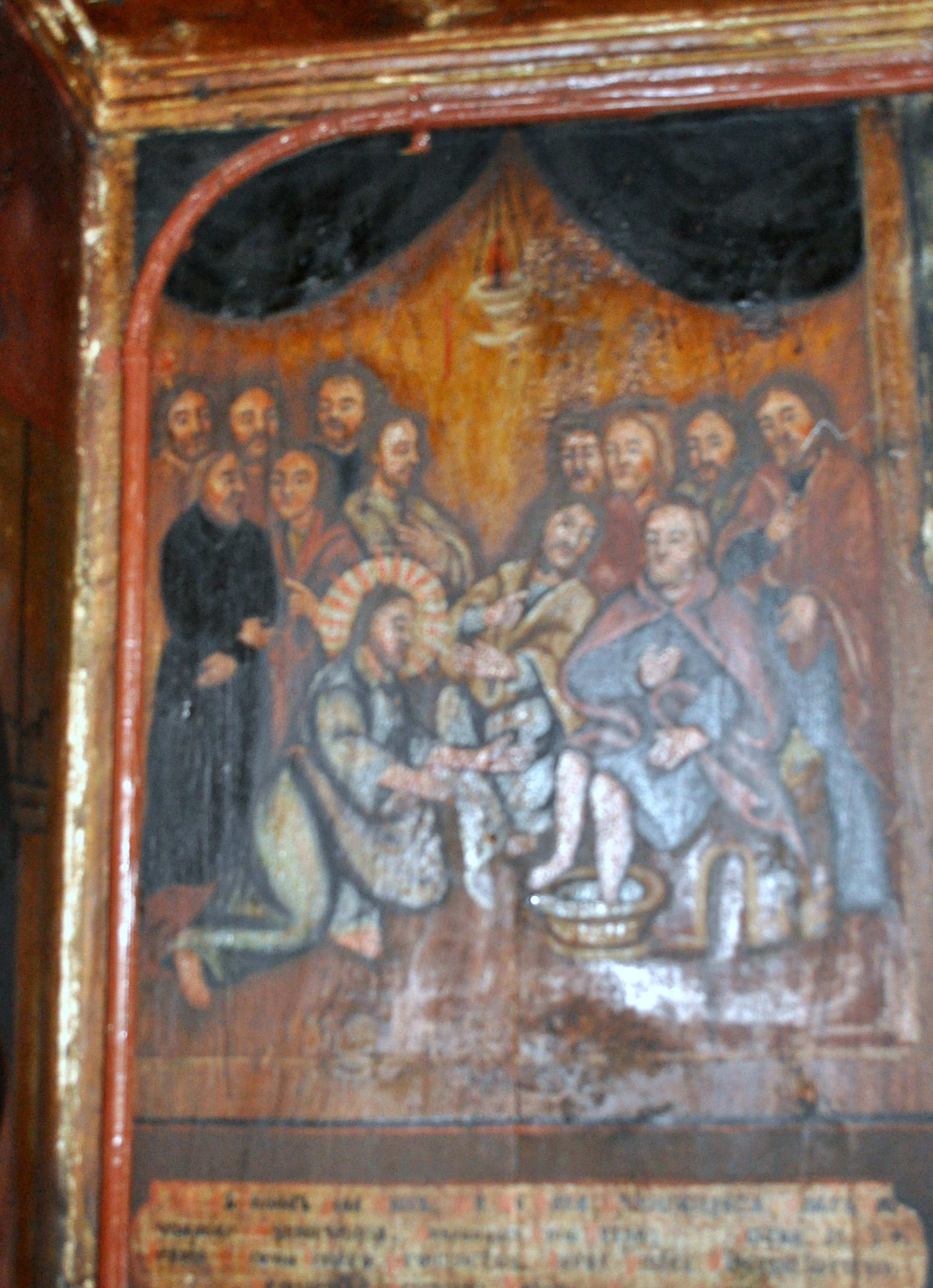 Biserica „Sf. Arhangheli Mihail și Gavriil” din Răstoci, județul Sălaj